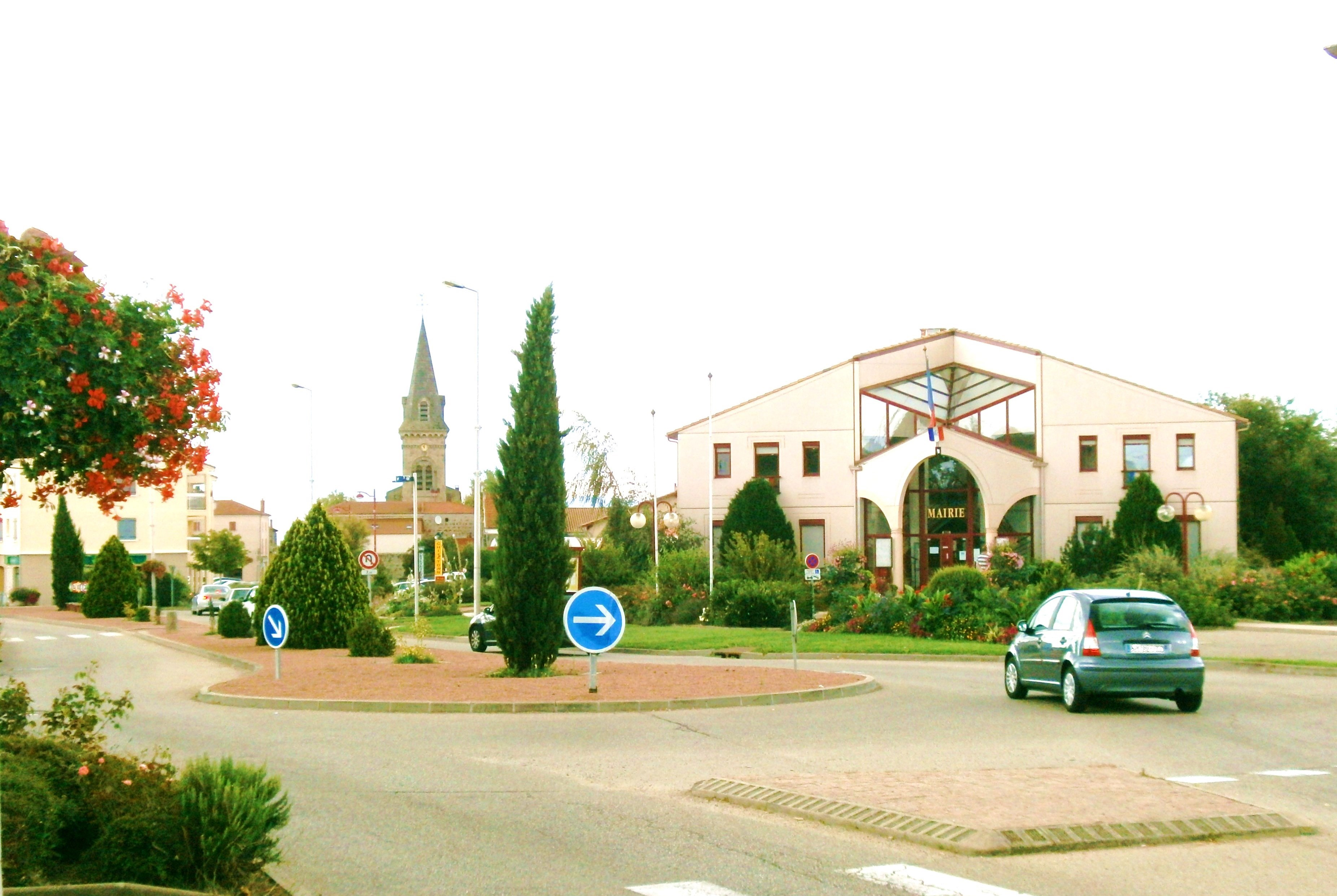 Davézieux, vue générale.